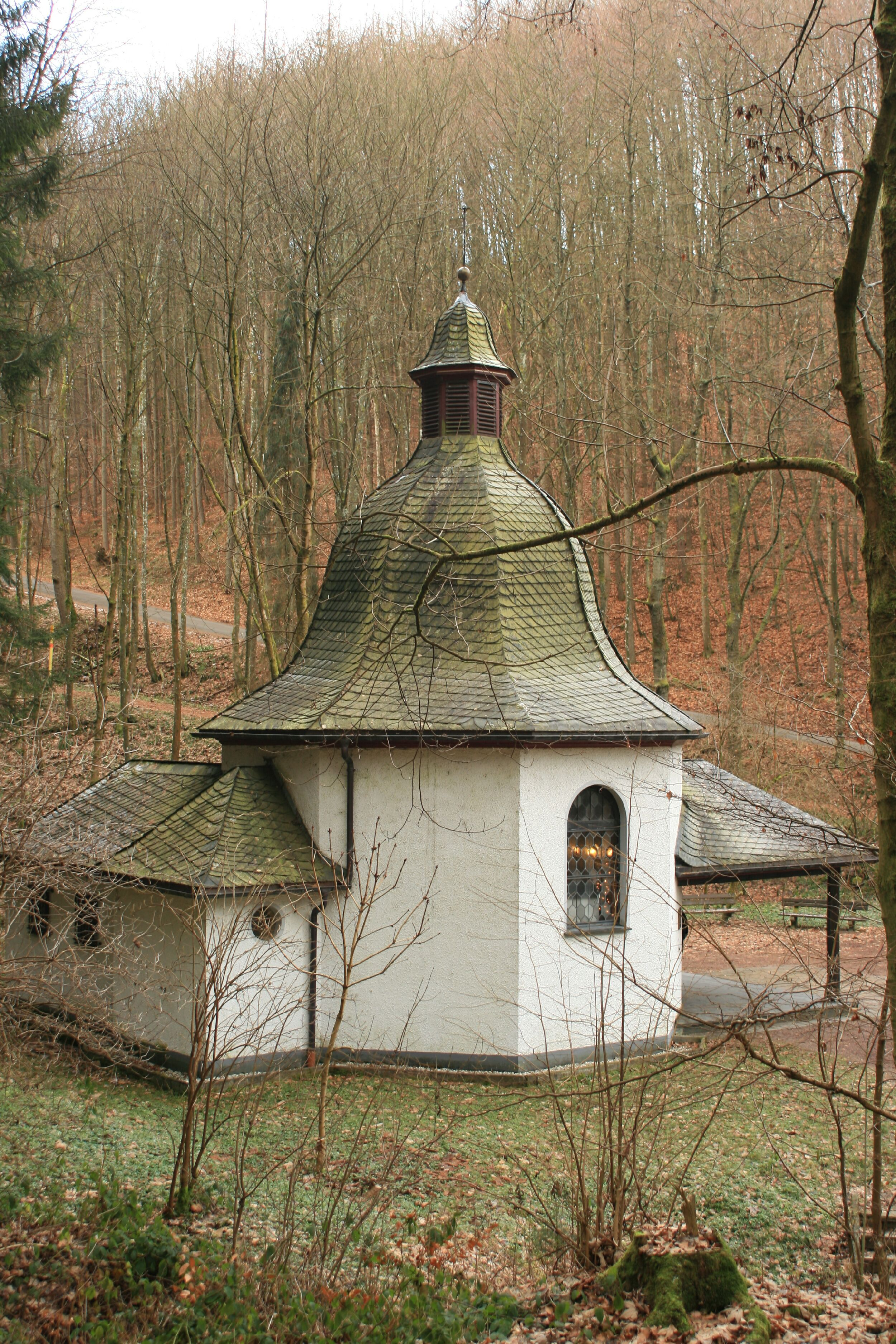 Kapelle Waldenburg bei Attendorn (Biggesee) am Fuße der Burg Waldenburg